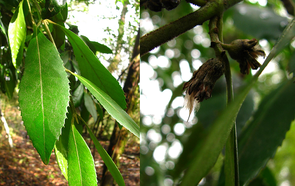 Laureliopsis philippiana o tepa - flor y fruto.